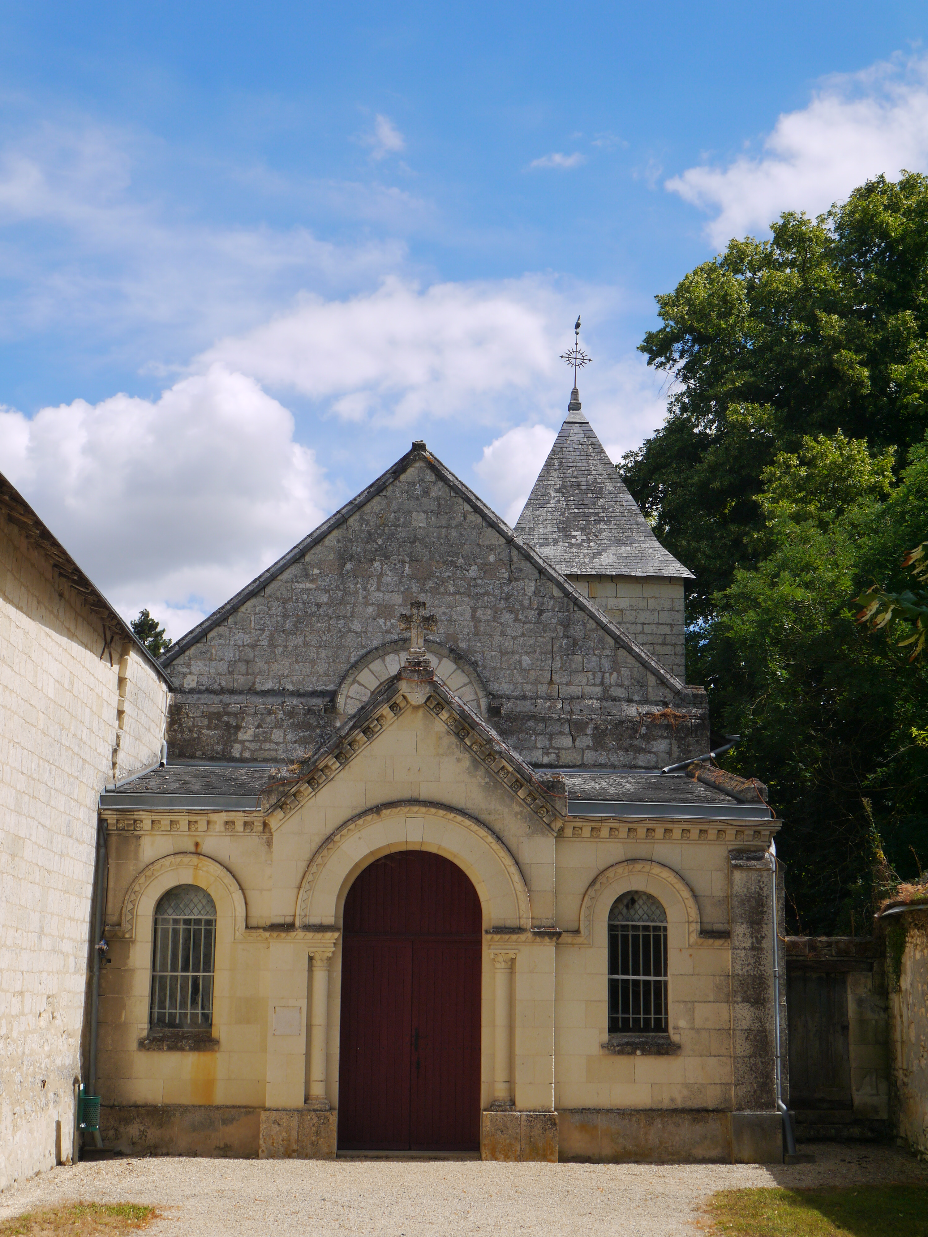 L'église Saint-Clair.